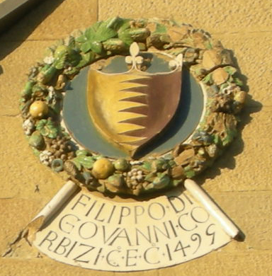 Sansepolcro, palazzo pretorio, stemma corbizi 1499